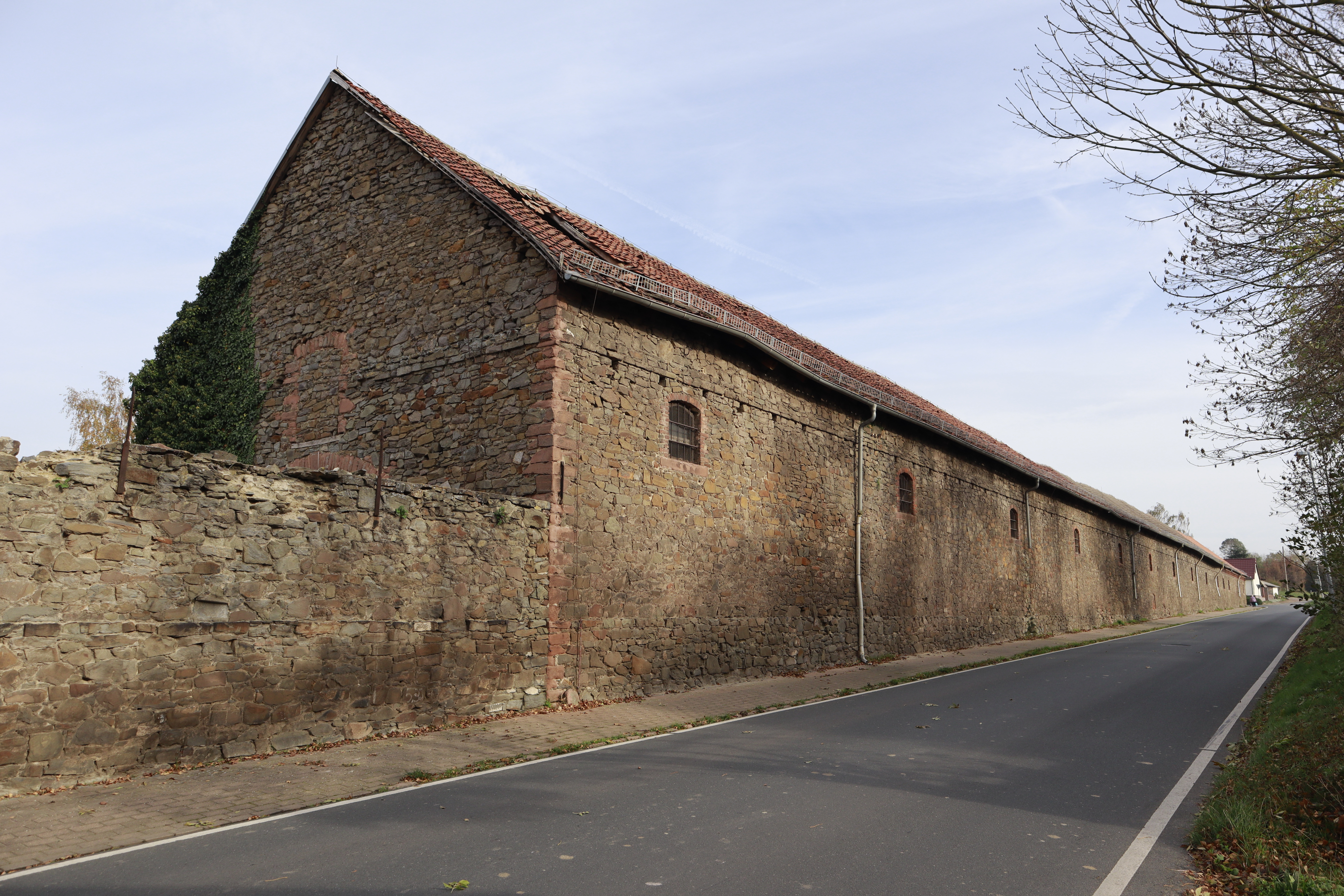 Unterhof (Hundisburg)